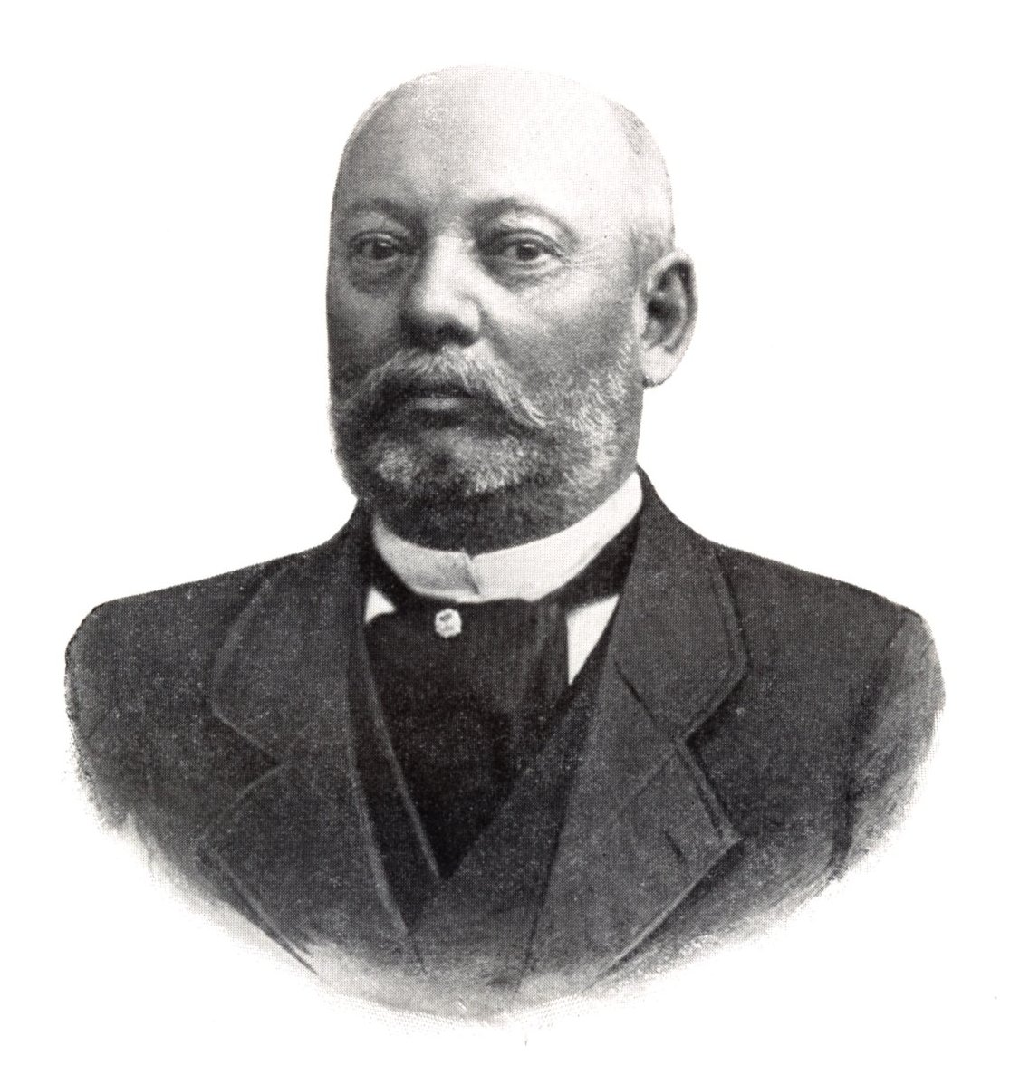 Eötvös Károly (1842-1916) ügyvéd, politikus